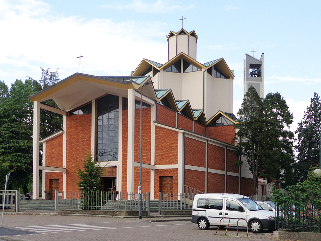 Milano, la chiesa della Madonna della Divina Provvidenza nel quartiere di Quinto Romano. Fu costruita nel 1958 su progetto di Amos Edallo.Fonte: Cecilia De Carli (a cura di), Le nuove chiese della diocesi di Milano. 1945-1993, Milano, Edizioni Vita e Pensiero, 1994, p. 143, ISBN 88-343-3666-6.